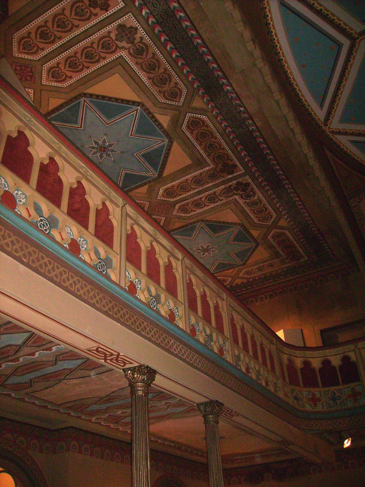 Synagoge (Hechingen) am 2. März 2009